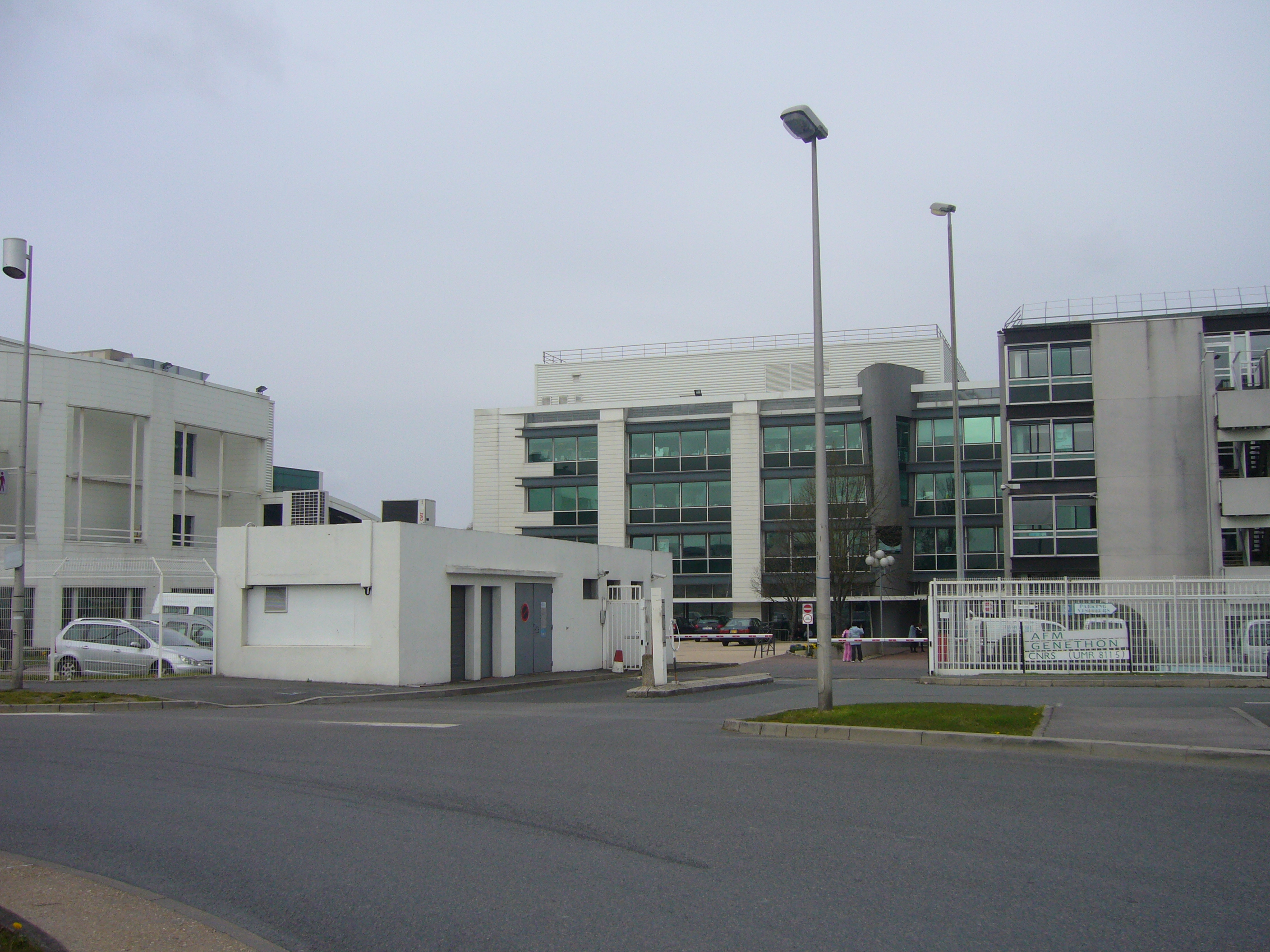 Le Généthon est un laboratoire de recherche situé à Évry (Essonne)